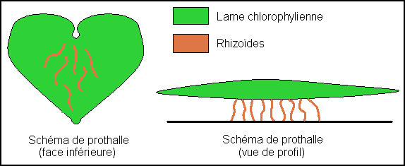 Vue inférieure et de profil d'un prothalle (schéma).